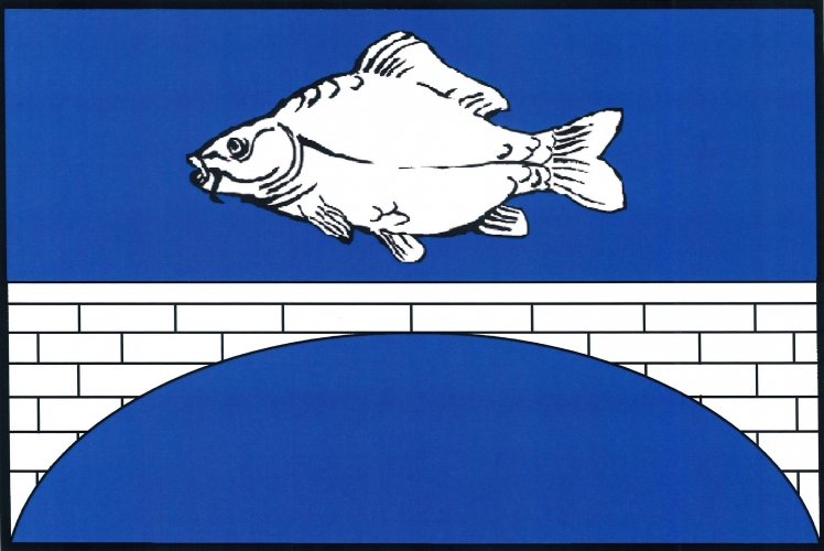 Vlajka, Tchořovice, okres Strakonice